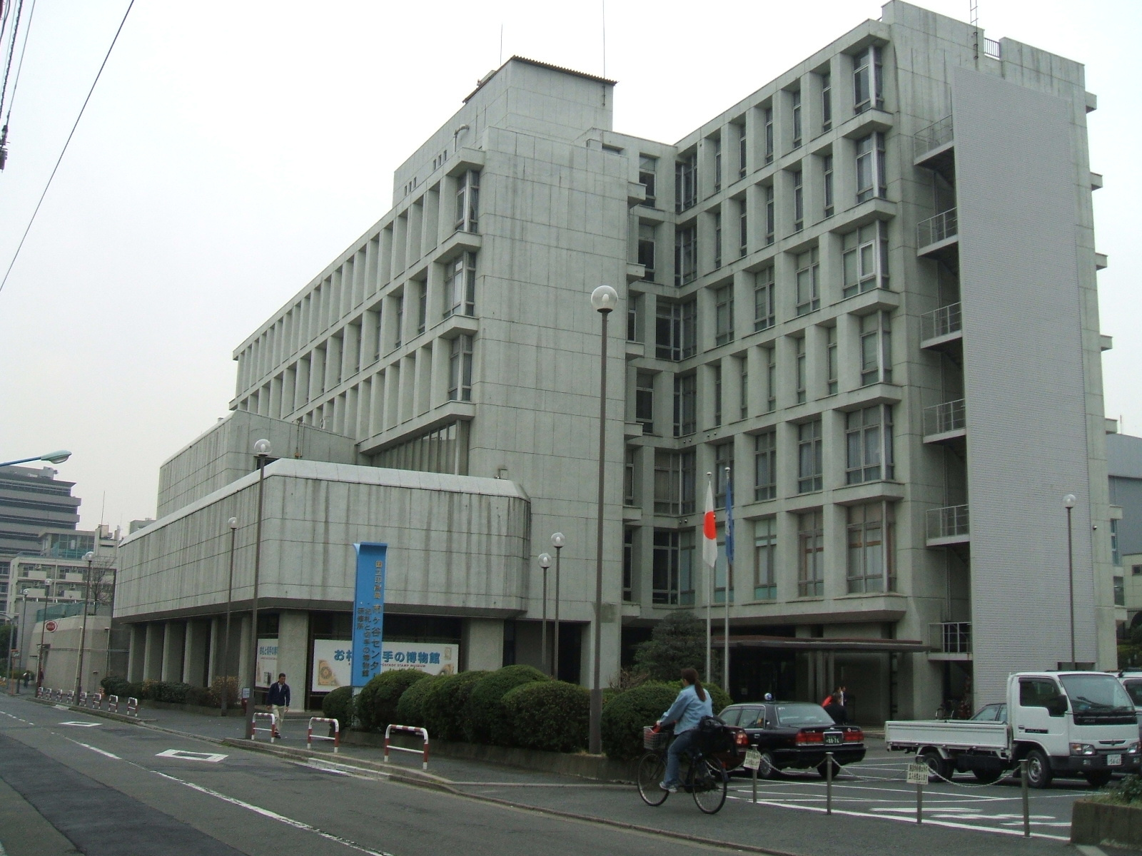 お札と切手の博物館（東京都）